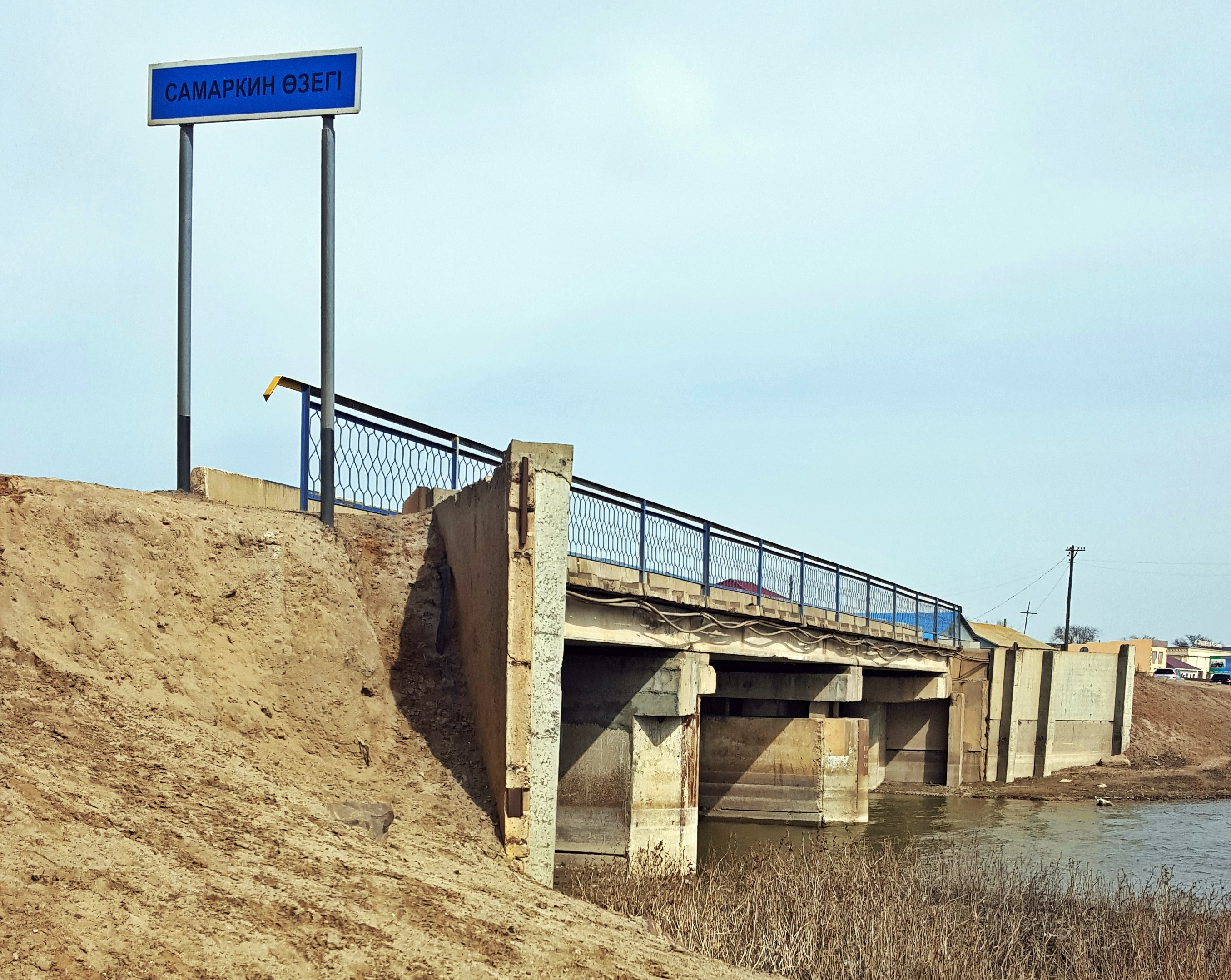 Қазақша (кирил): Ганюшкиндегі саны бірнеше кішкентай көпірлердің бірі.